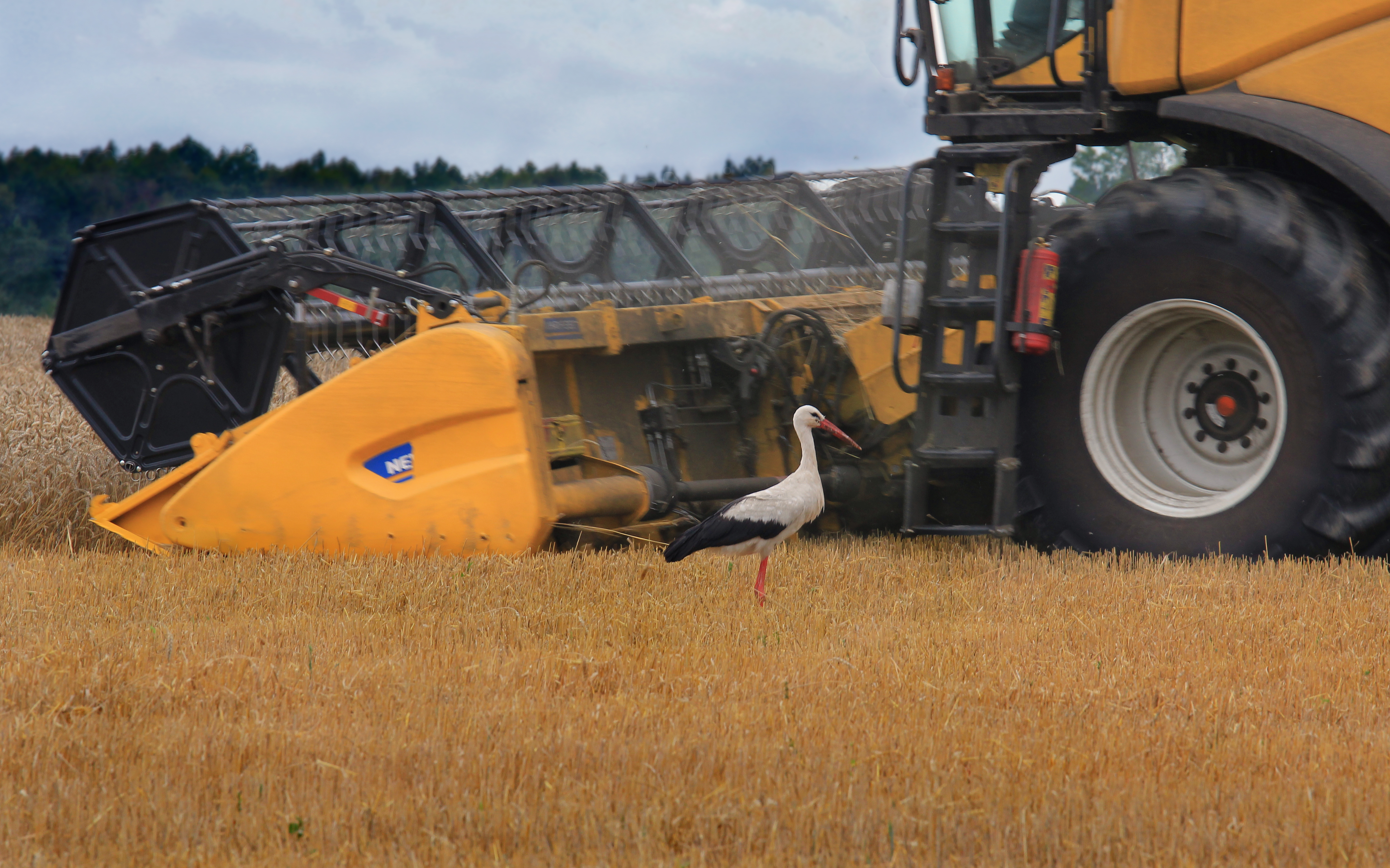 Valge toonekurg kombaini heedriga